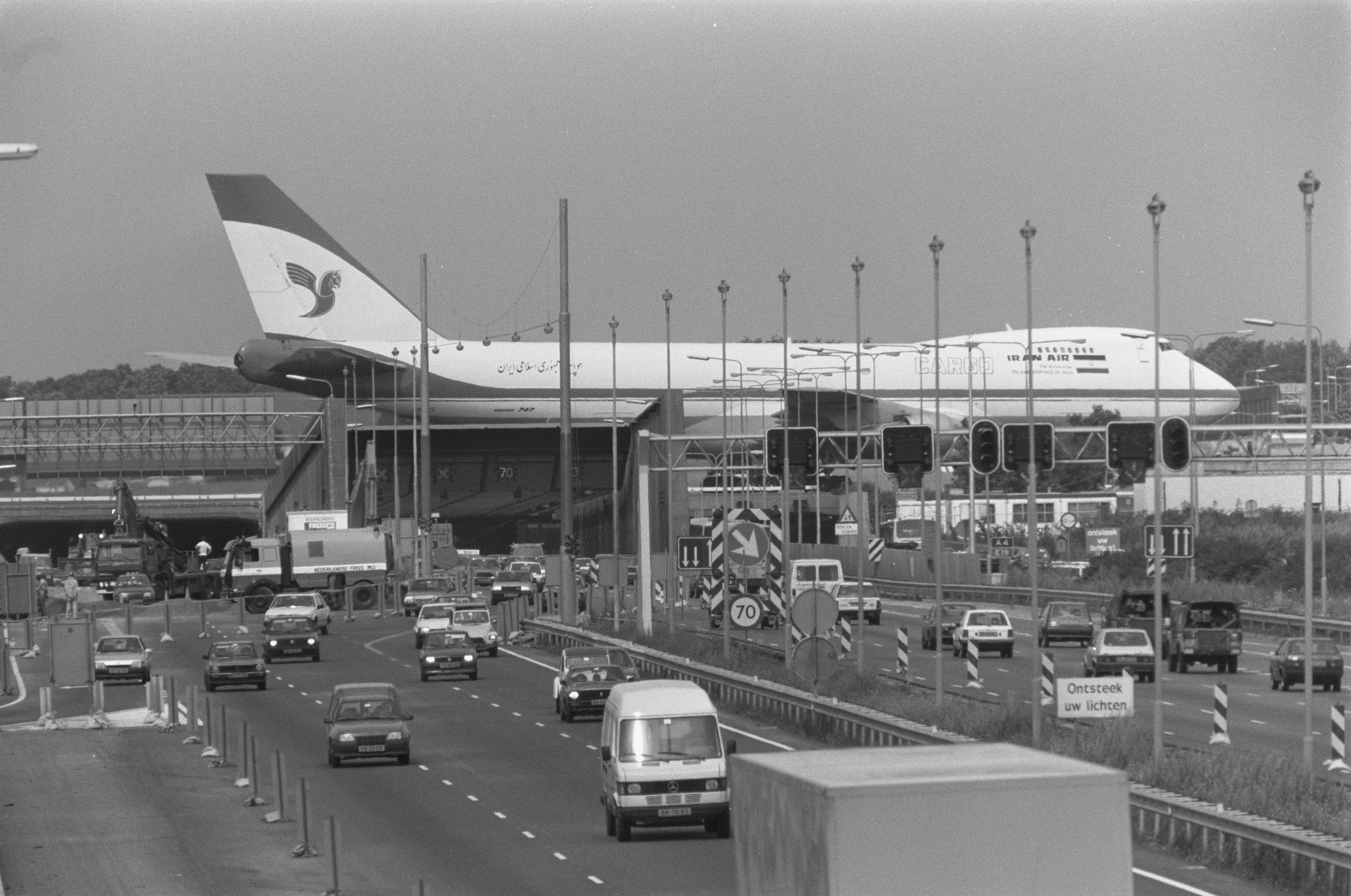 Collectie / Archief : Fotocollectie Anefo Reportage / Serie : [ onbekend ] Beschrijving : Werkzaamheden aan Schipholtunnel begonnen; overzicht met vliegtuig en verkeer Datum : 21 juli 1988 Locatie : Noord-Holland, Schiphol Trefwoorden : VERKEER, vliegtuigen Instellingsnaam : Schipholtunnel Fotograaf : Bogaerts, Rob / Anefo Auteursrechthebbende : Nationaal Archief Materiaalsoort : Negatief (zwart/wit) Nummer archiefinventaris : bekijk toegang 2.24.01.05 Bestanddeelnummer : 934-2896